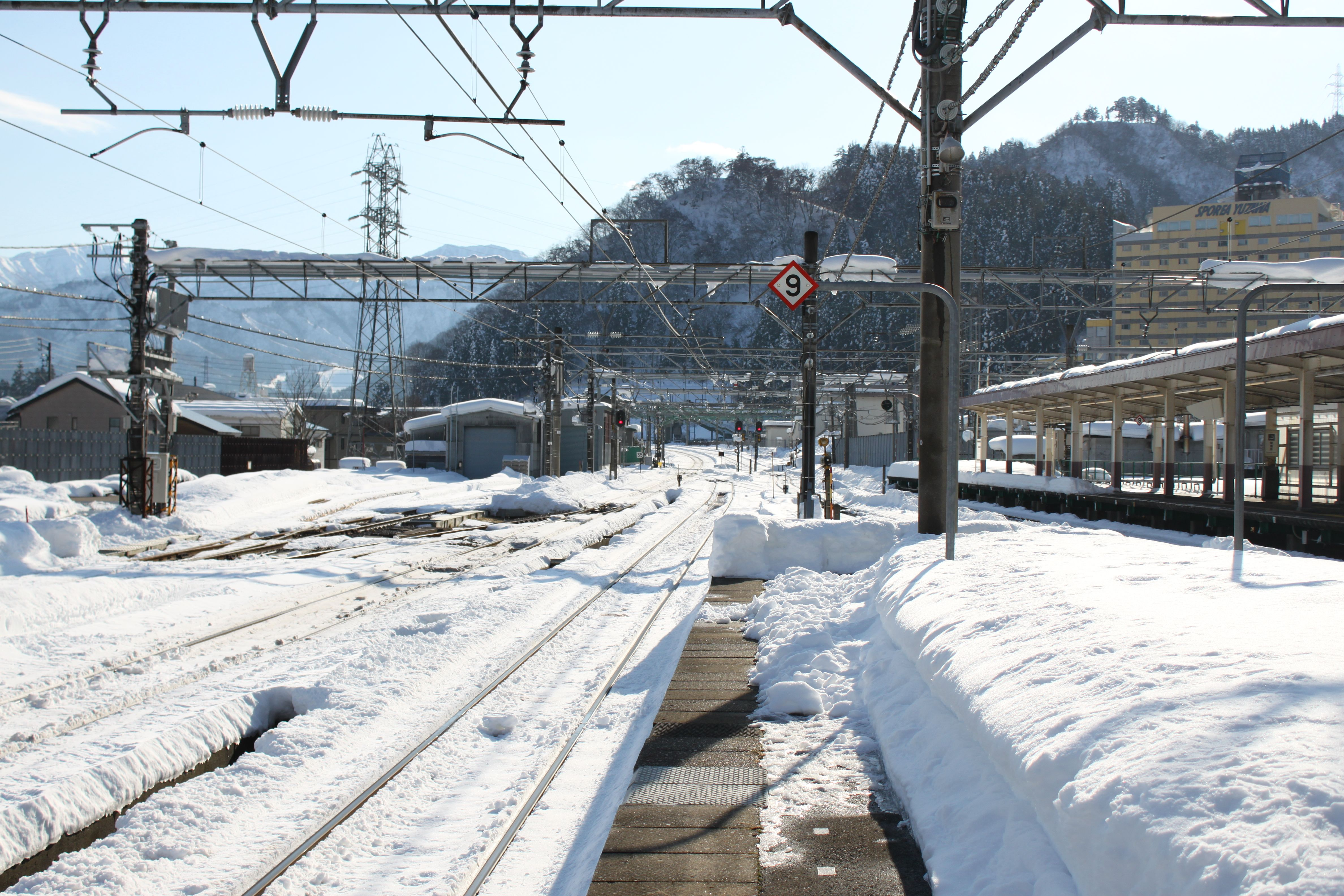 越後湯沢駅